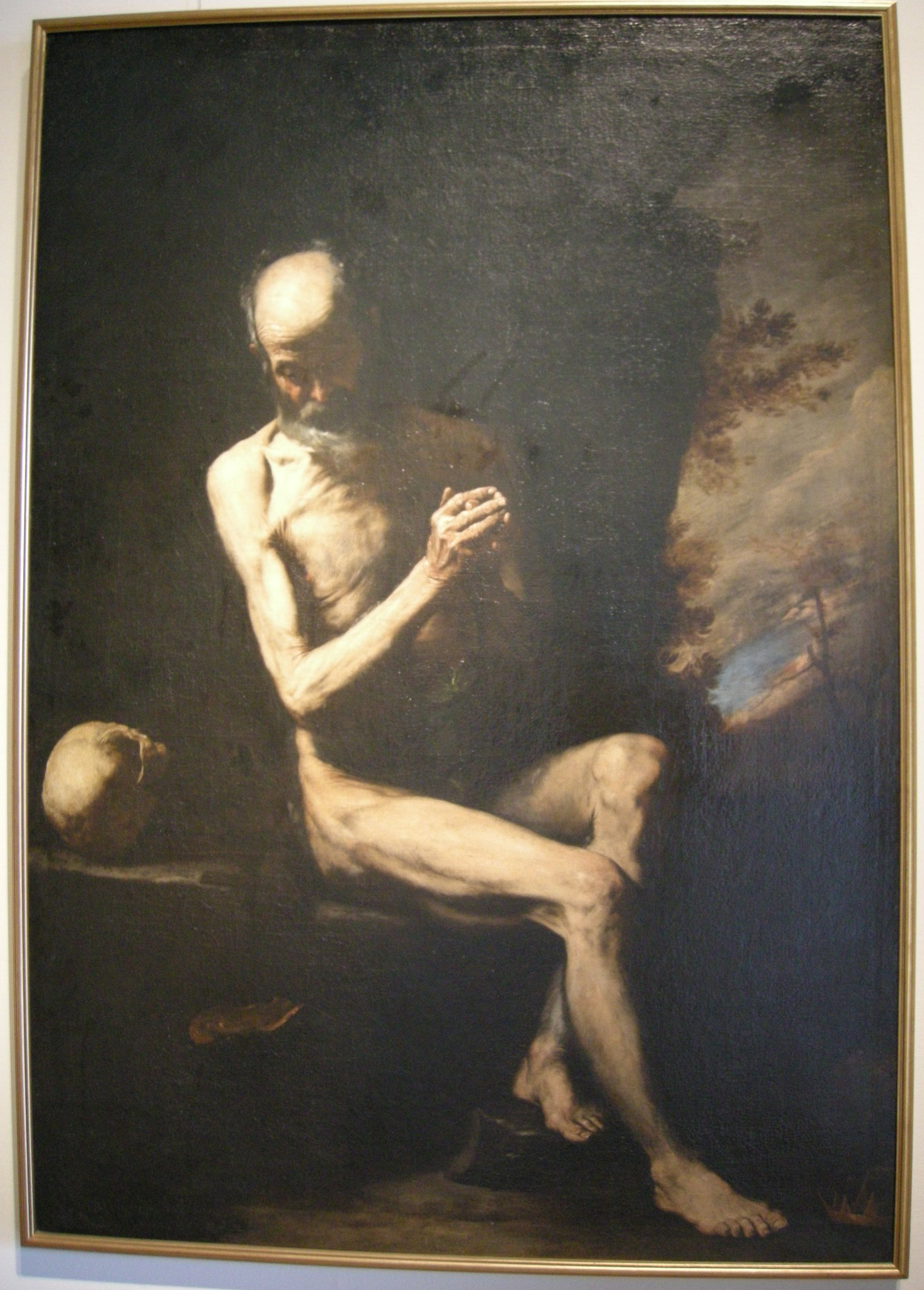 Jusepe de Ribera detto "Lo spagnoletto", Santo eremita, 1650 circa. Pinacoteca del Castello Sforzesco, Milano.